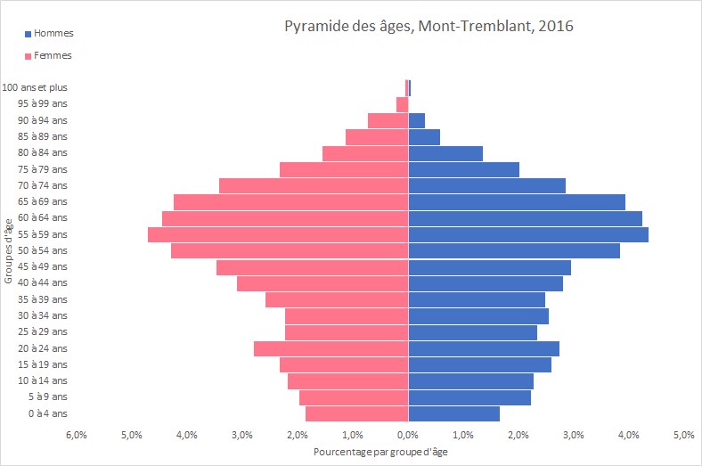 Données tirées du recensement de 2016.